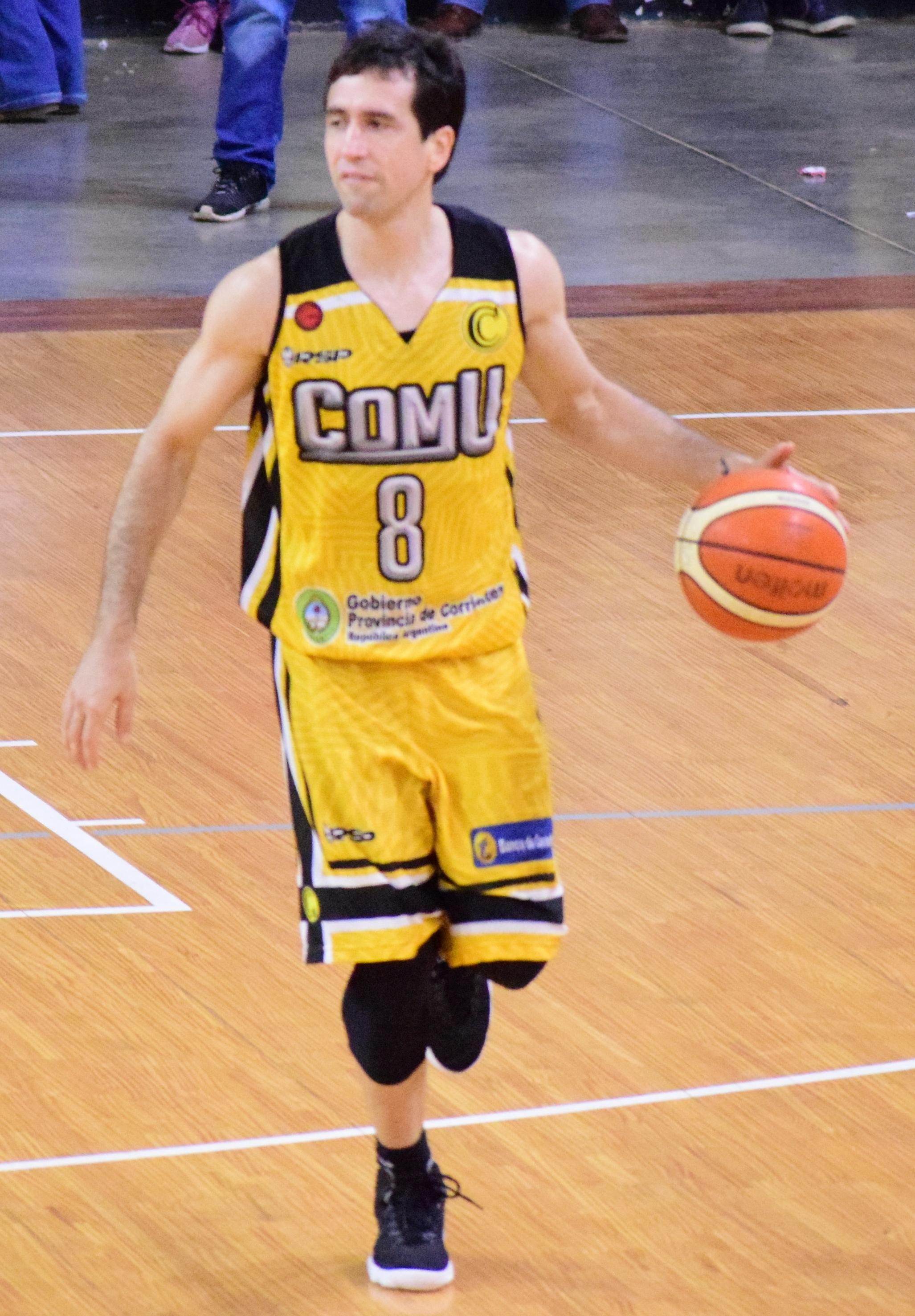 Jugador de Comunicaciones en la LNB